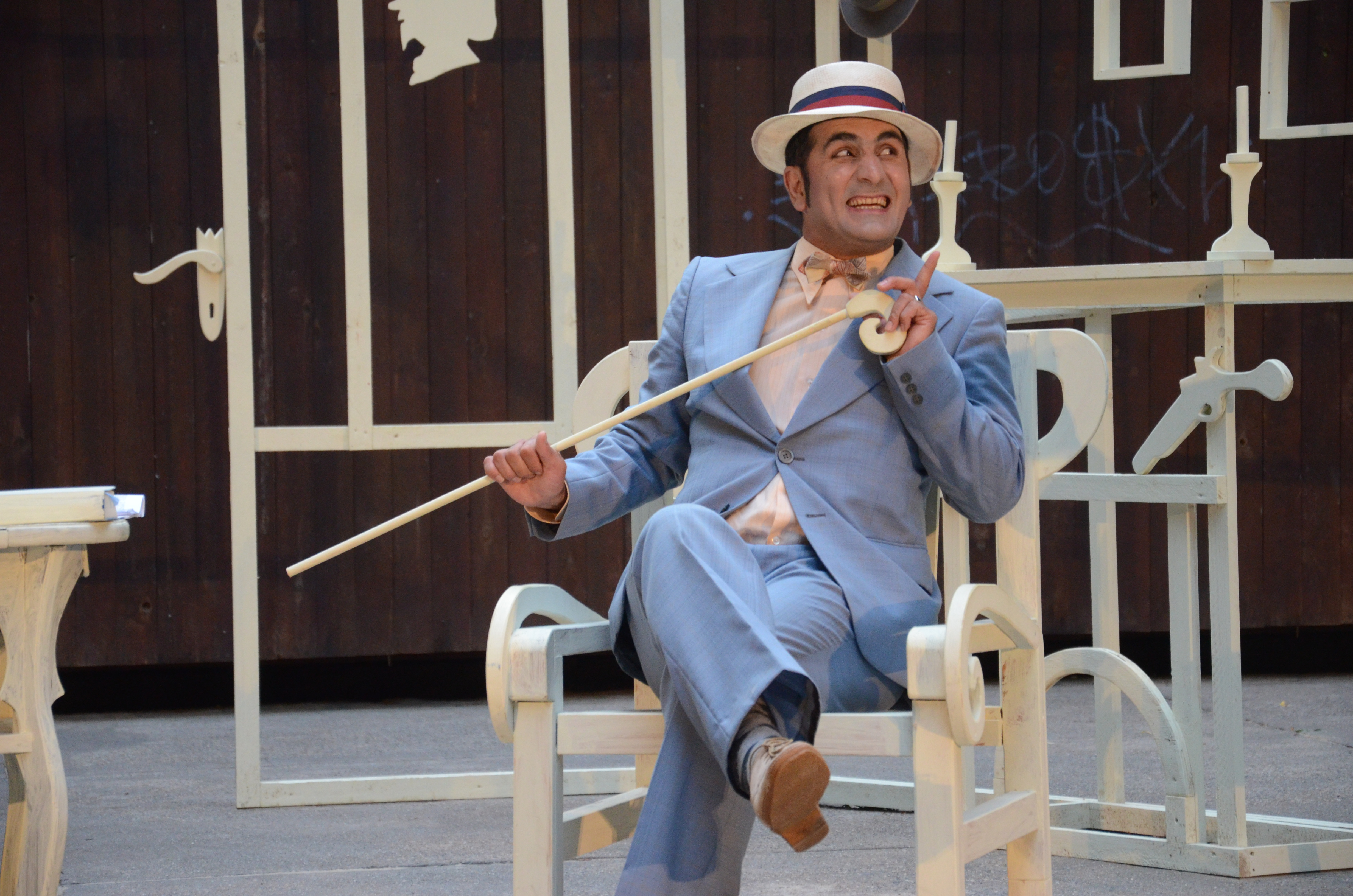 Tuncay Gary als Sherlock Holmes in Arthur Conan Doyles "Sherlock Holmes: Der Hund von Baskerville" 09.08.2013 auf der Freilichtbühne in Petzow.